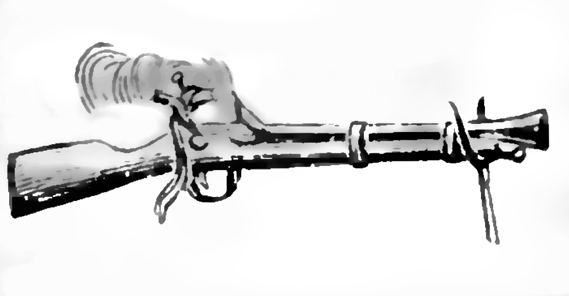 Ilustracja ze „Słownika ilustrowanego języka polskiego”